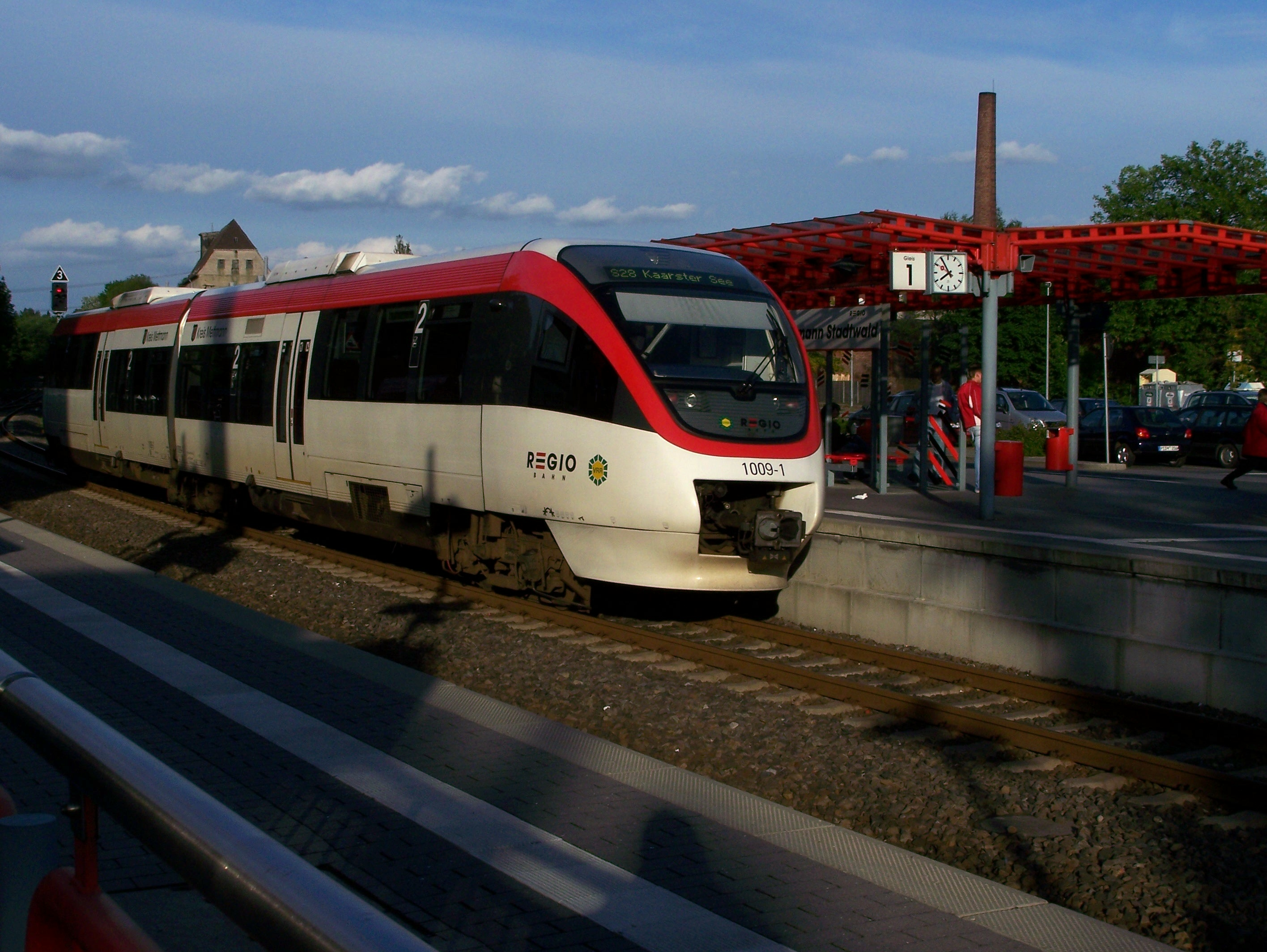 Mettmann, Regio-Bahn